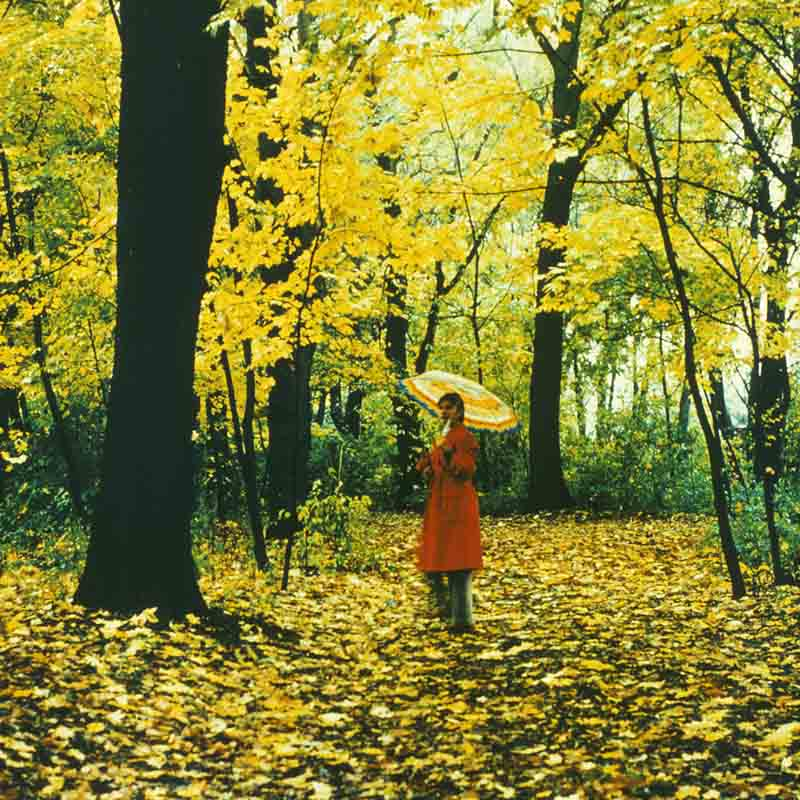 Donduseni District.